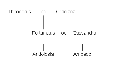 Familie, Stammbaum der Familie von Fortunatus